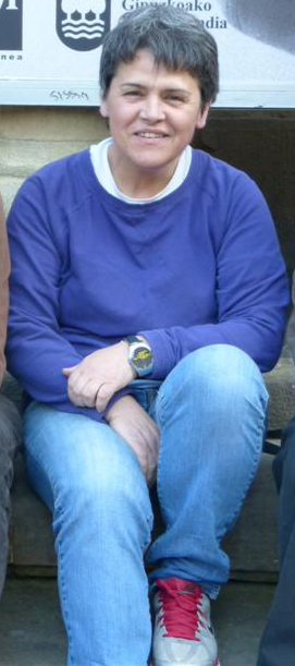 Itxaro Borda idazlea 2013an